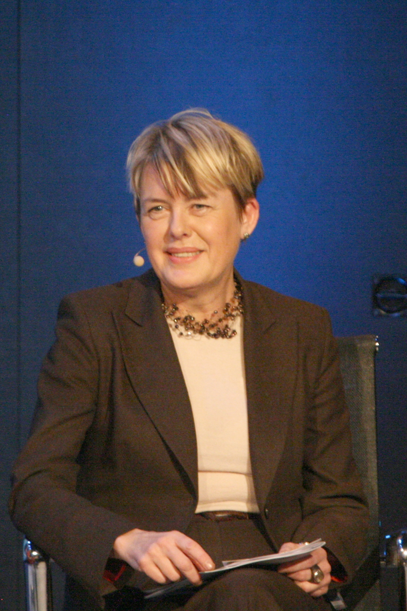 Astrid Søgnen, direktør for utdanningsetaten i Oslo, tidligere statssekretær. Fra NHOs Årskonferanse 2009.